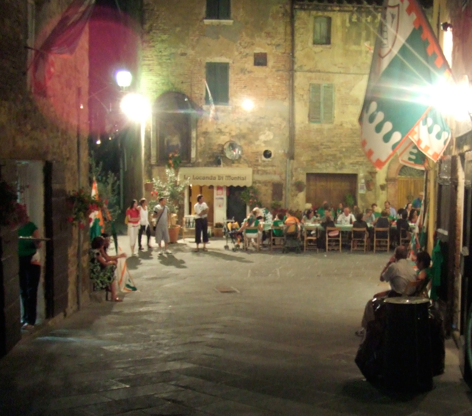 Pavois devant le siège d'une contrade - Repas dans les rues du borgo de Montisi lors de la Giostra del Simone